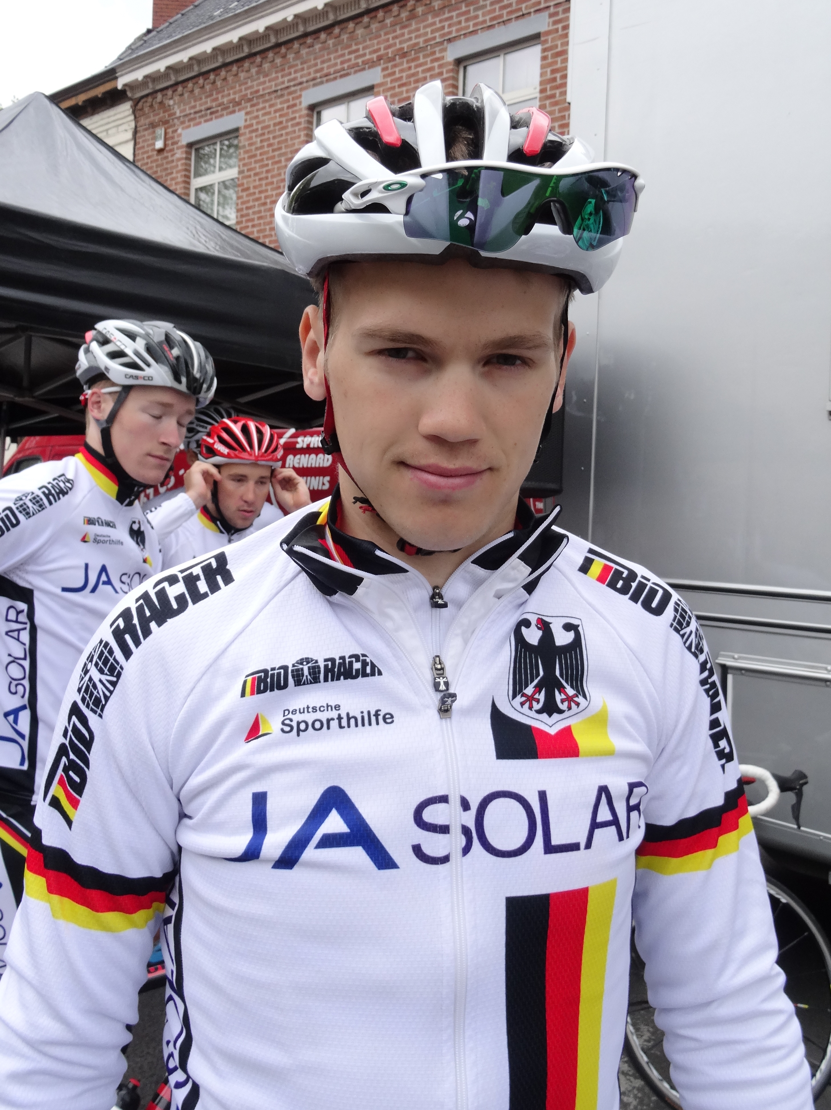 Triptyque des Monts et Châteaux 2014, étape 3, 6 avril 2014, départ de Belœil. Depicted person: Ruben Zepuntke Depicted team: Équipe nationale d'Allemagne espoirs The creation of these files was made possible thanks to the organizers of the Triptyque des Monts et Châteaux 2014 English | français | +/−